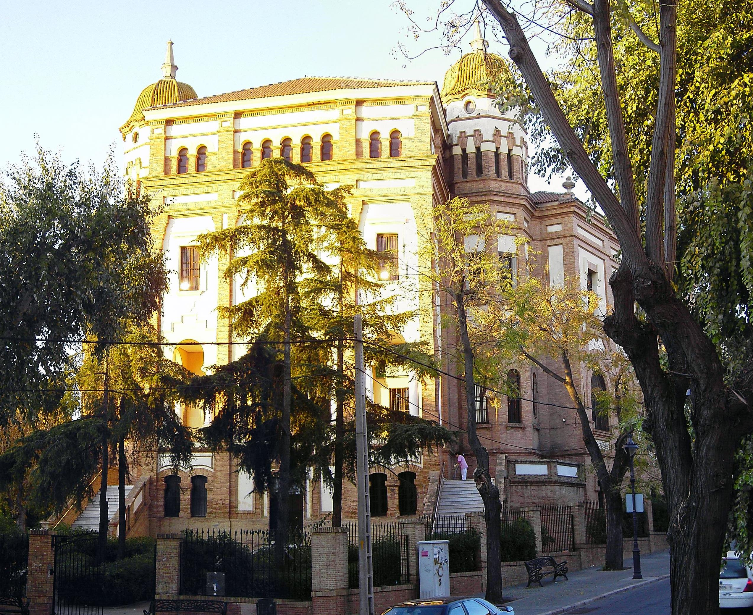 IES La Rabida Huelva